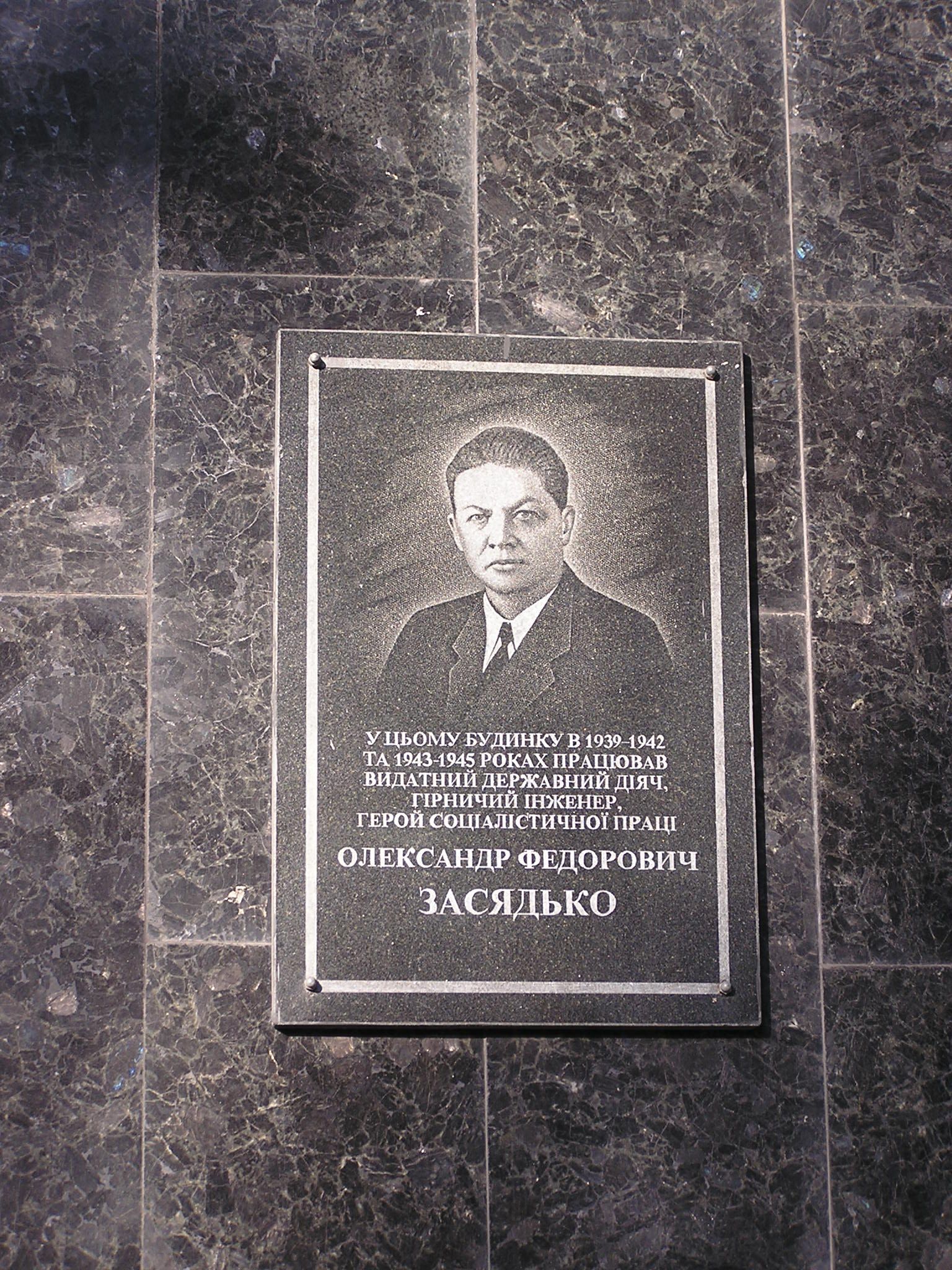 мемориальная табличка в Донецке